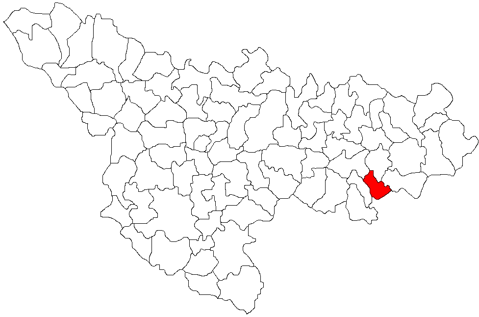 Criciova, Timis Licensing Categorie:Hărţi ale judeţului Timiş